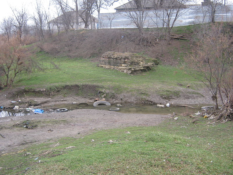 Фундамент мельницы на реке Карамык, до революции принадлежавшей семье Черноволенко в Светлограде